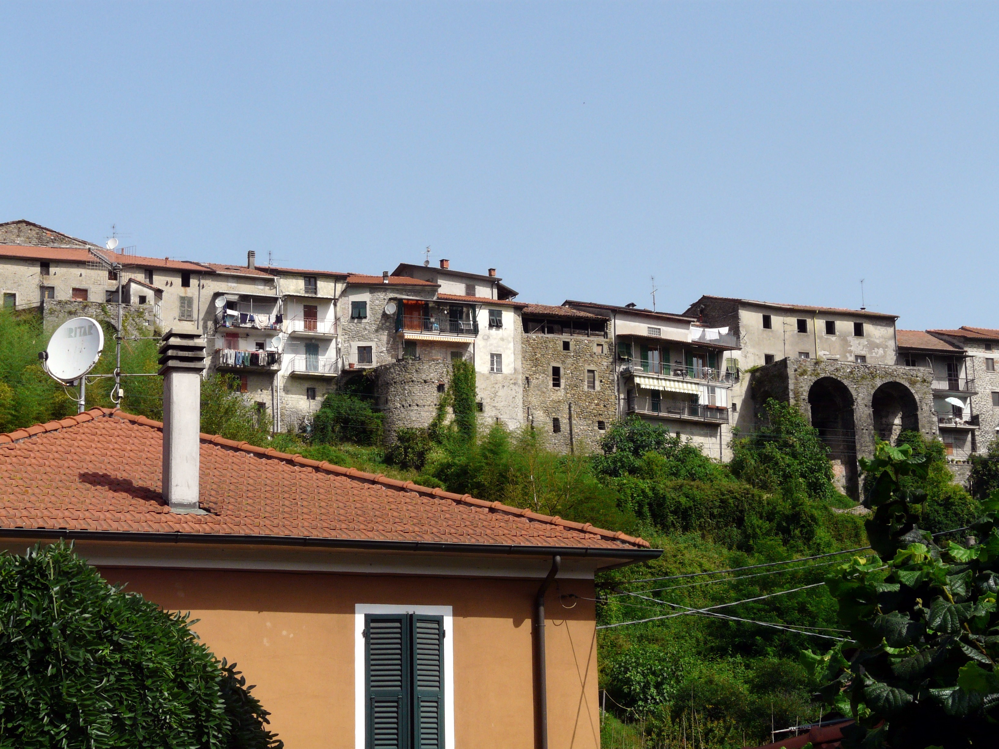 Panorama di Soliera, Fivizzano, Toscana, Italia